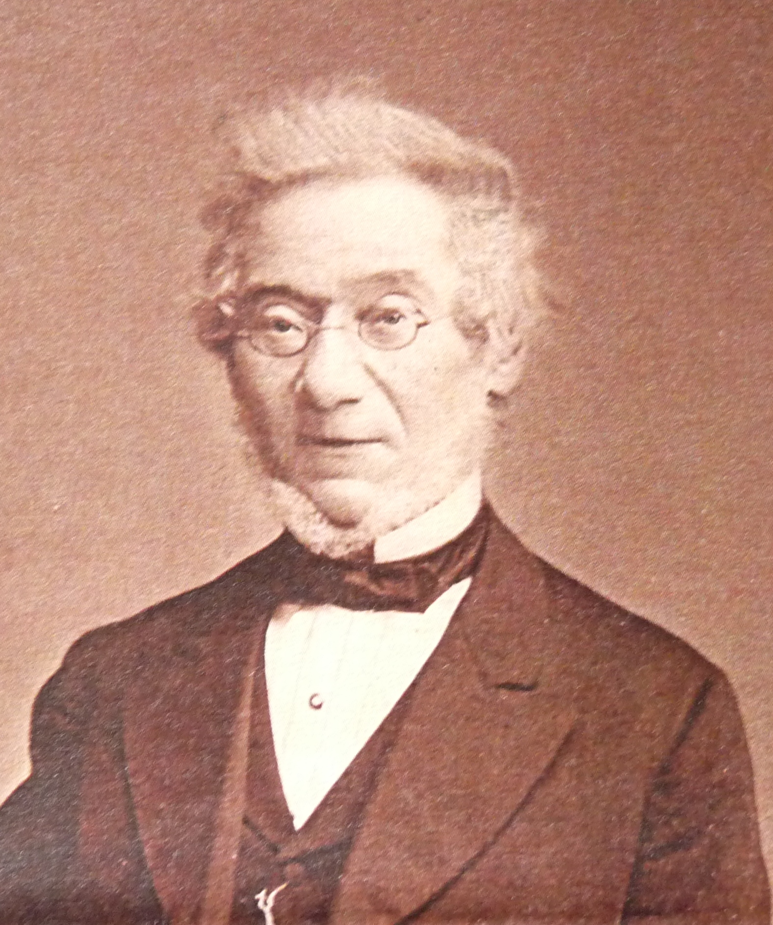 Jakob Martin Philippi um 1865